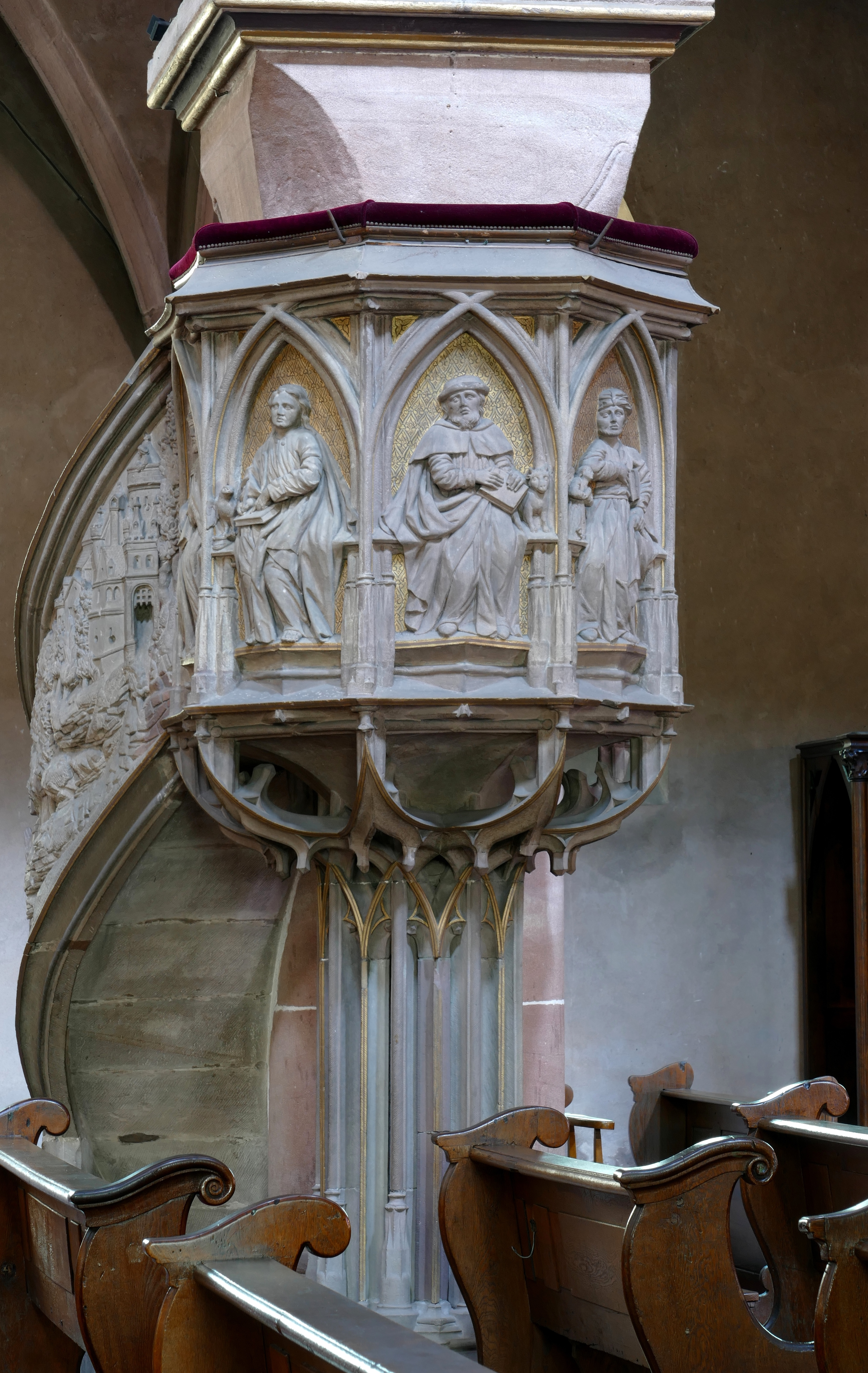 Alsace, Bas-Rhin, Église Saint-Georges de Haguenau (PA00084724, IA00061901). Chaire à prêcher (Veit WAGNER, 1500): This object is classé Monument Historique in the base Palissy, database of the French furniture patrimony of the French ministry of culture, under the references PM67000797 and IM67002091.